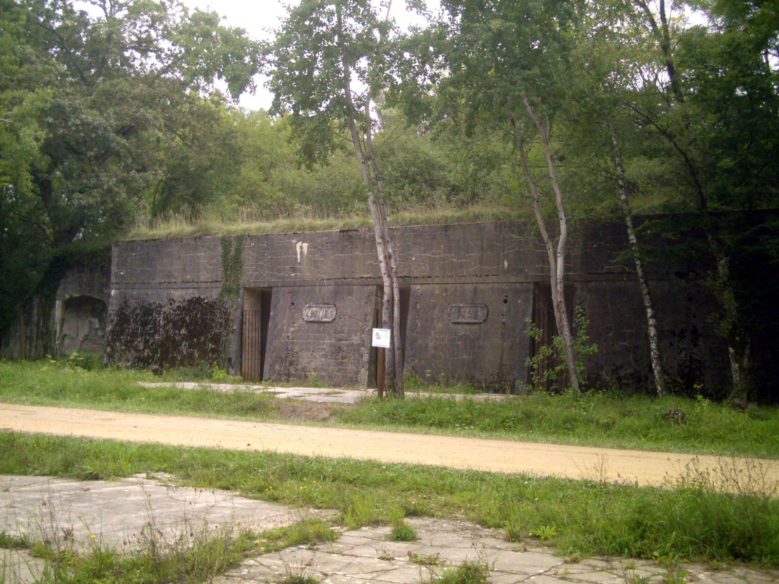 Fort du Vieux Canton, abri de combat n°2